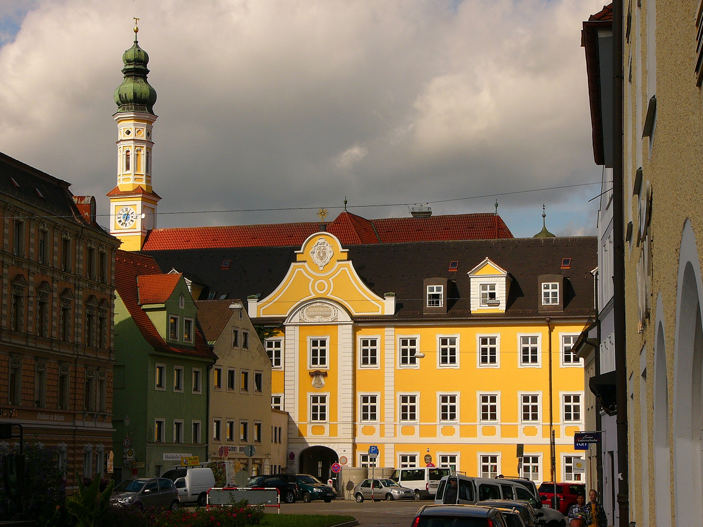 Aussenansicht der Abtei Seligenthal.